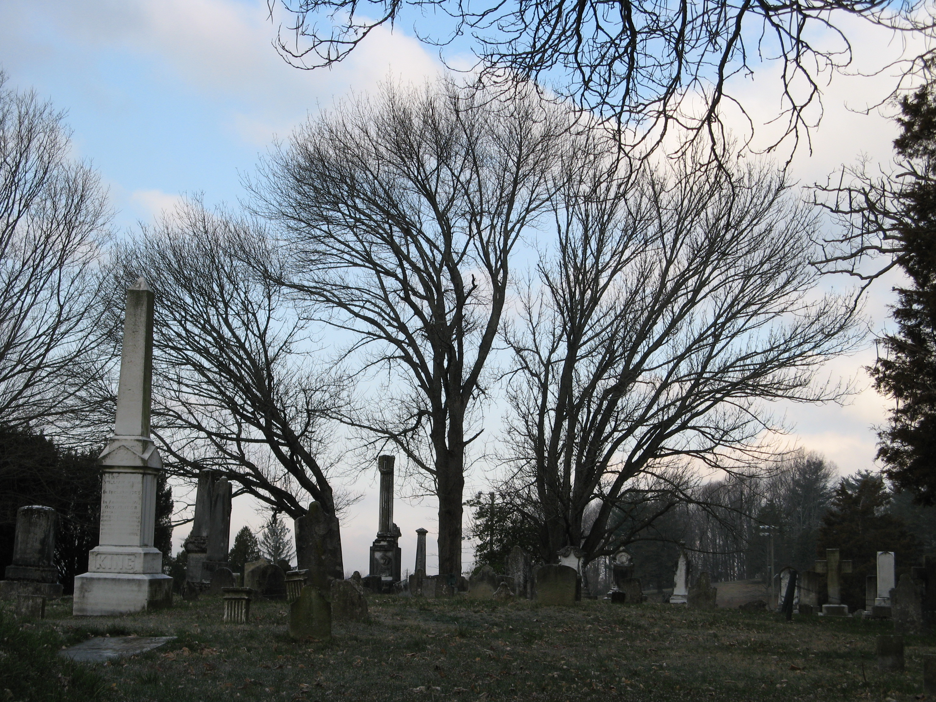 Abington, Virginia.